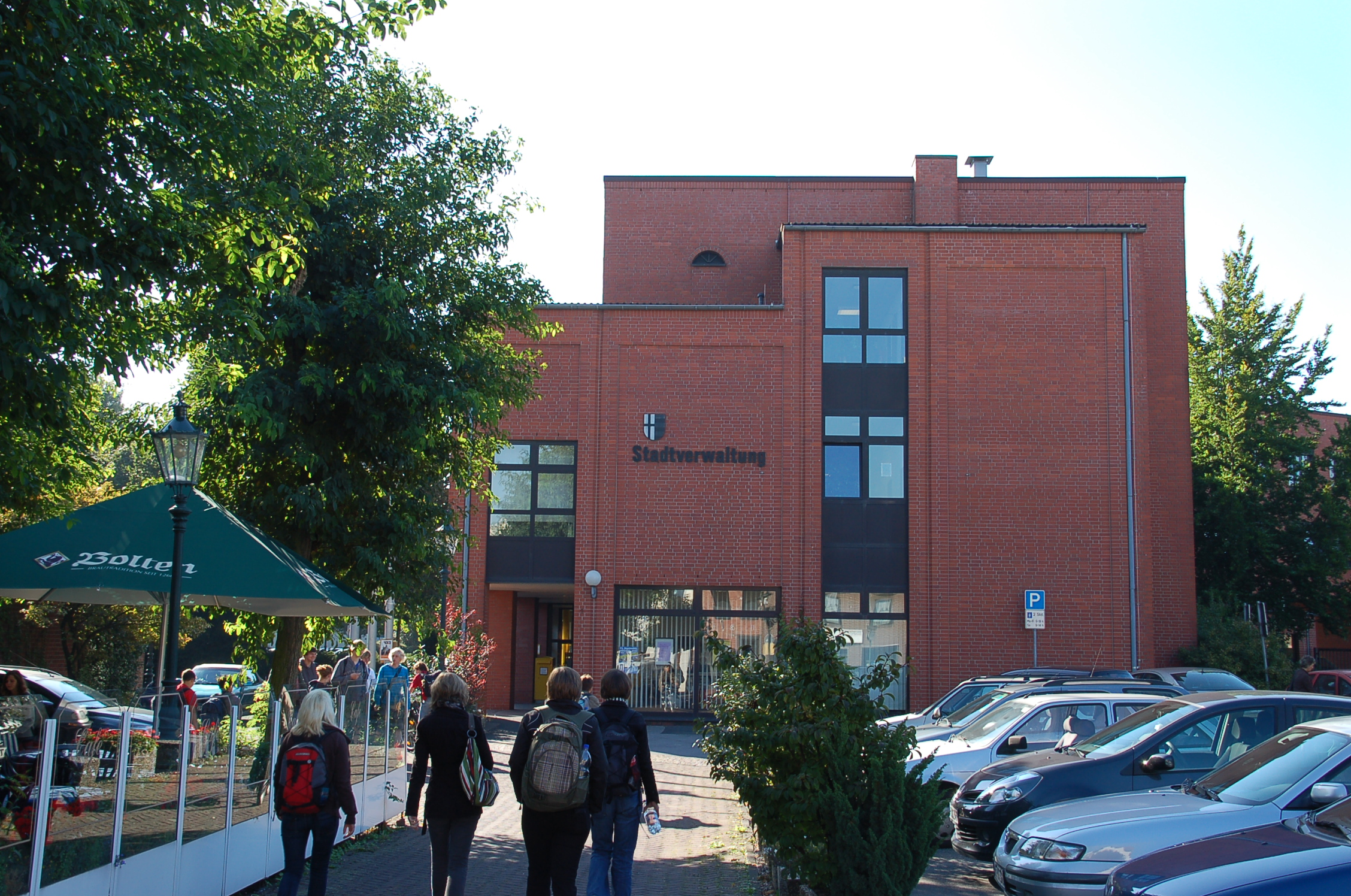 Das Rathaus von Korschenbroich